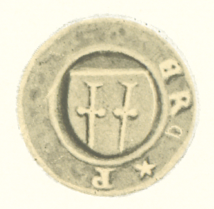 Paimiolaisen aatelisen Erik Puranpojan sinetti.